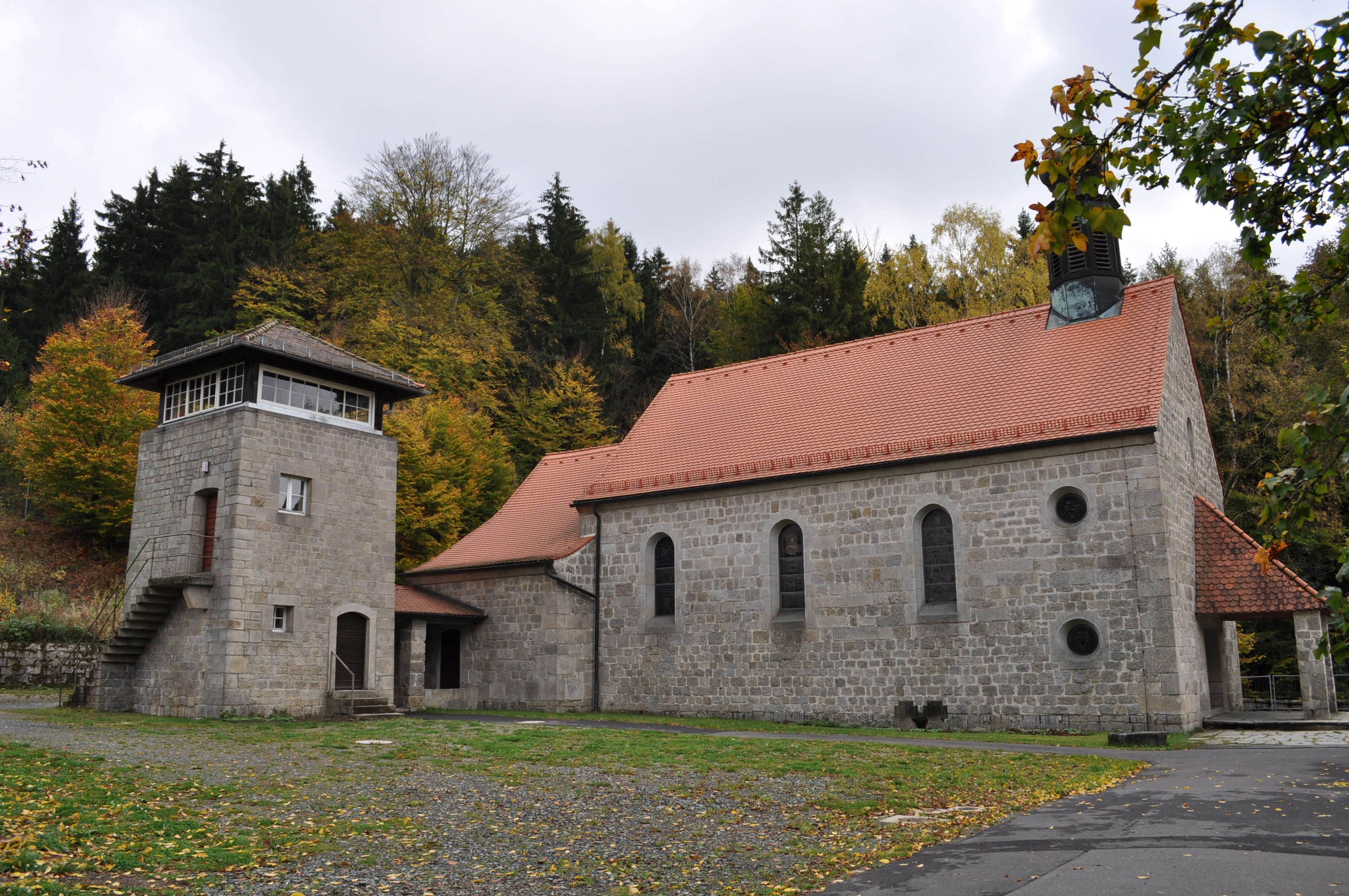 Konzentrationslager Flossenbürg